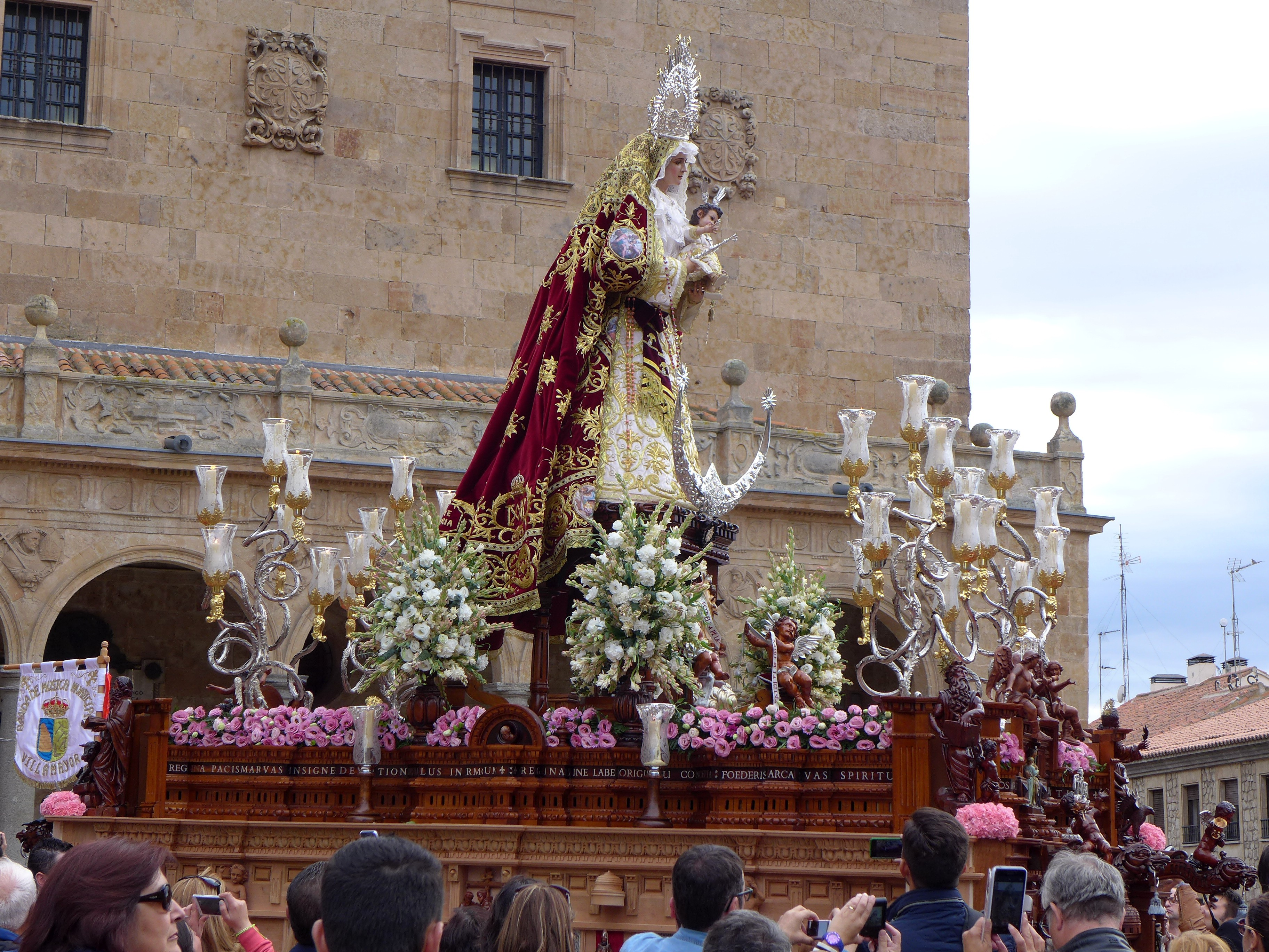 Procesión de Ntra. Sra. del Rosario. Salamanca. España